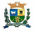 Brasão do município de Santa Rosa de Goiás, Goiás (State), Brasil